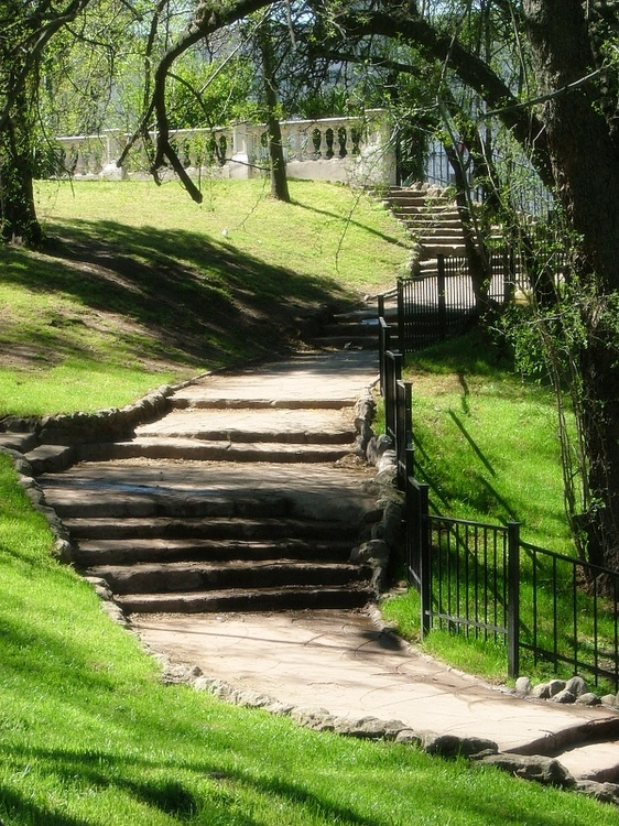 Vista del Parque Lezama